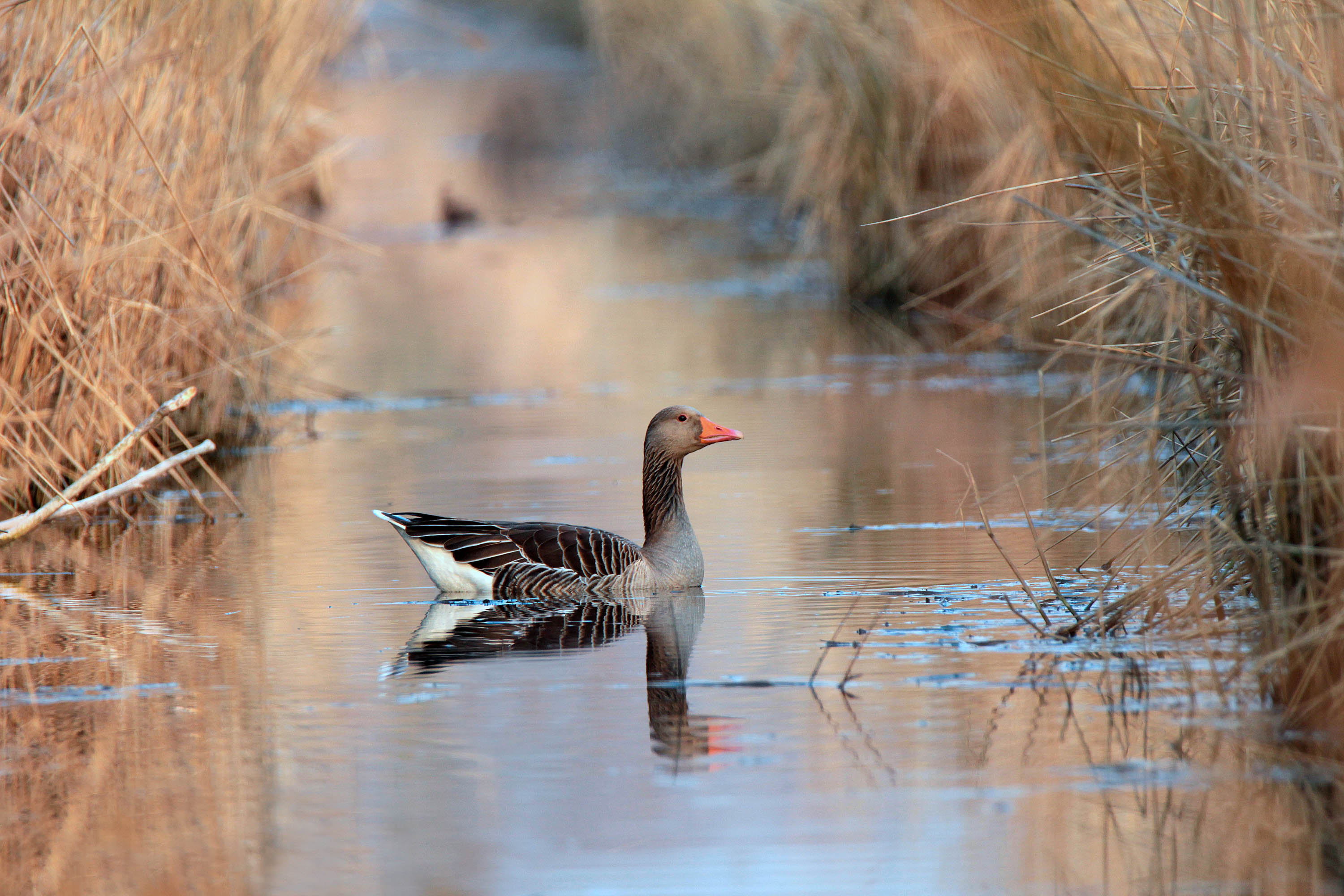 Graugans (Anser anser) im Naturschutzgebiet „Hahnheimer Bruch“ im Landkreis Mainz-Bingen, Rheinland-Pfalz